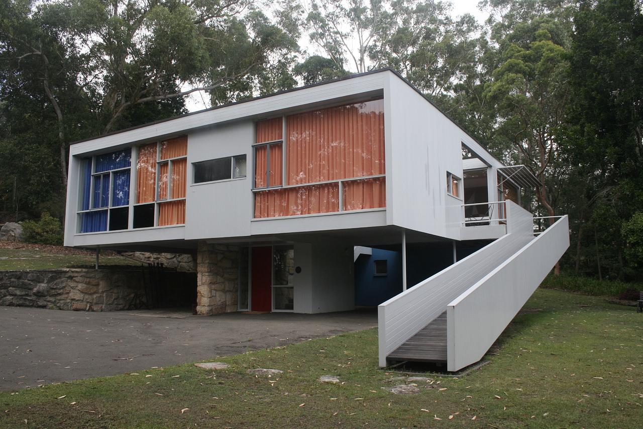 Harry Seidler, architecte : Rose Seidler House